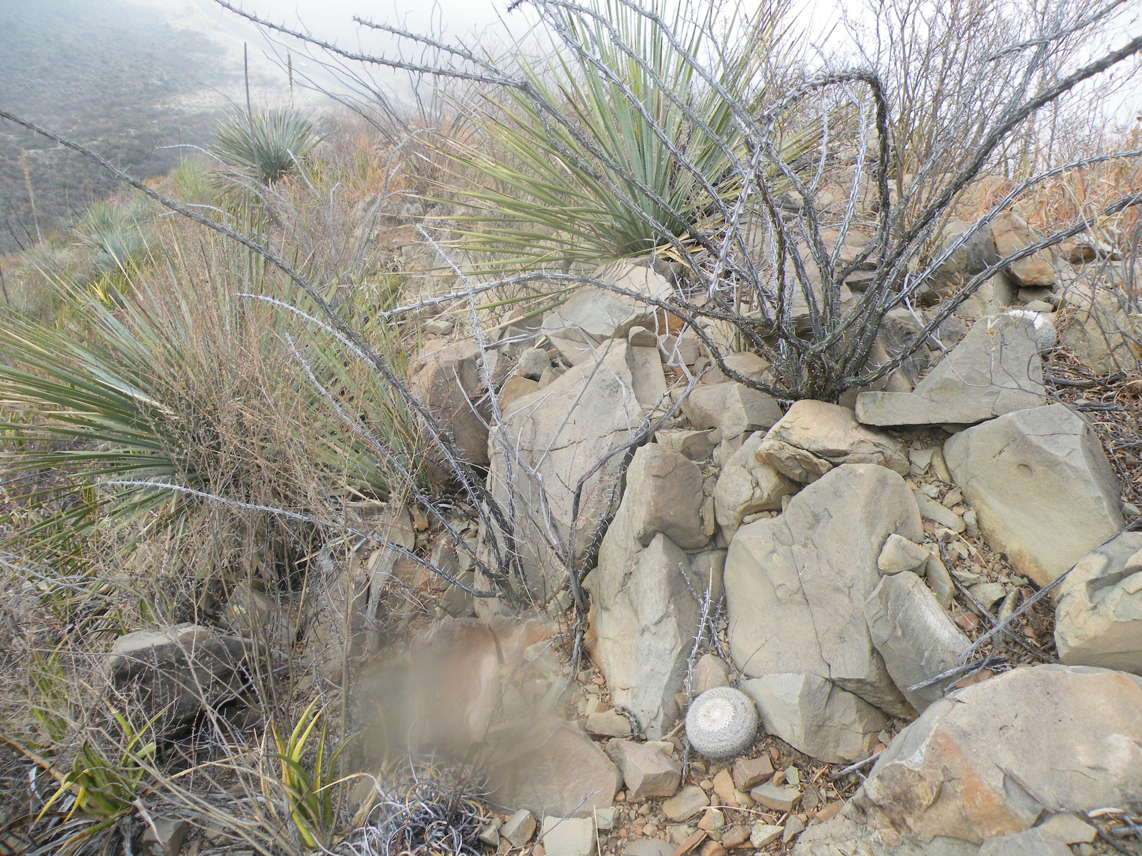 From Saltillo to Estacion Marte, Nuevo Leon